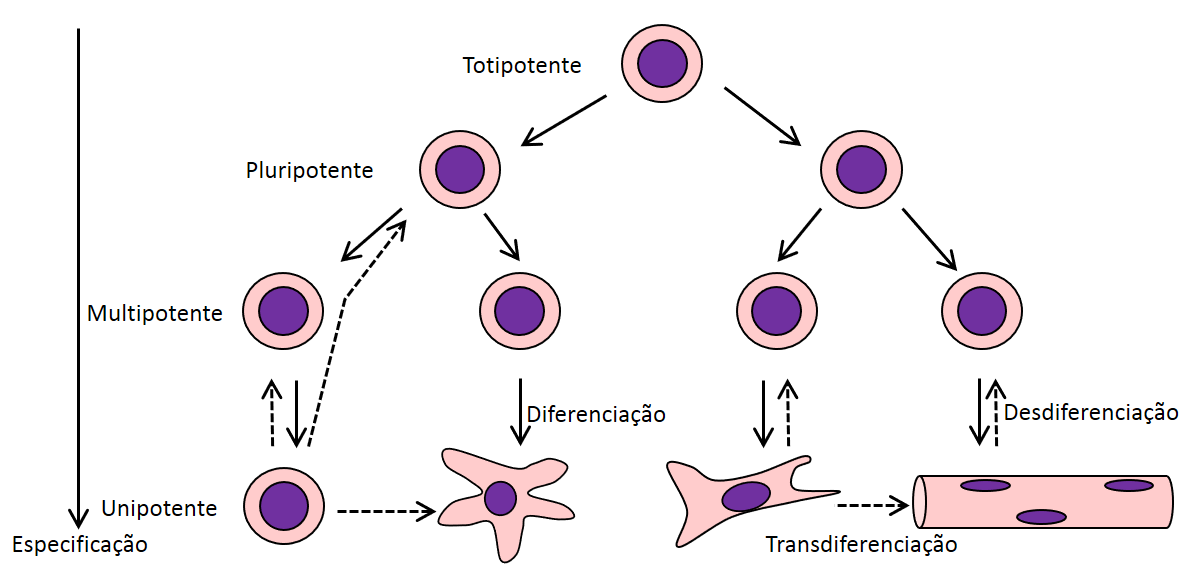 Um esquema representando os possíveis destinos de uma célula, incluindo desdiferenciação, transdiferenciação e a potência da célula